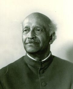 Musharaff Khan